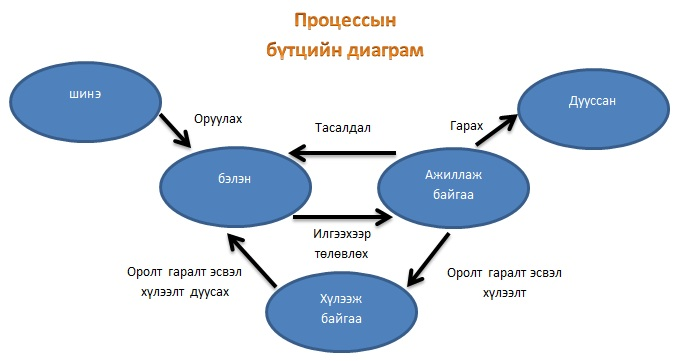 Монгол: Процессийн бүтцийн диаграм